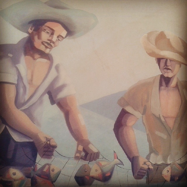 Detalhe de um dos murais que enfeita a rodoviária de Patos de Minas